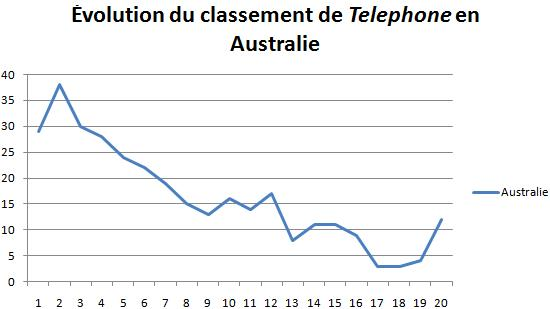 Évolution du classement de Telephone en Australie.